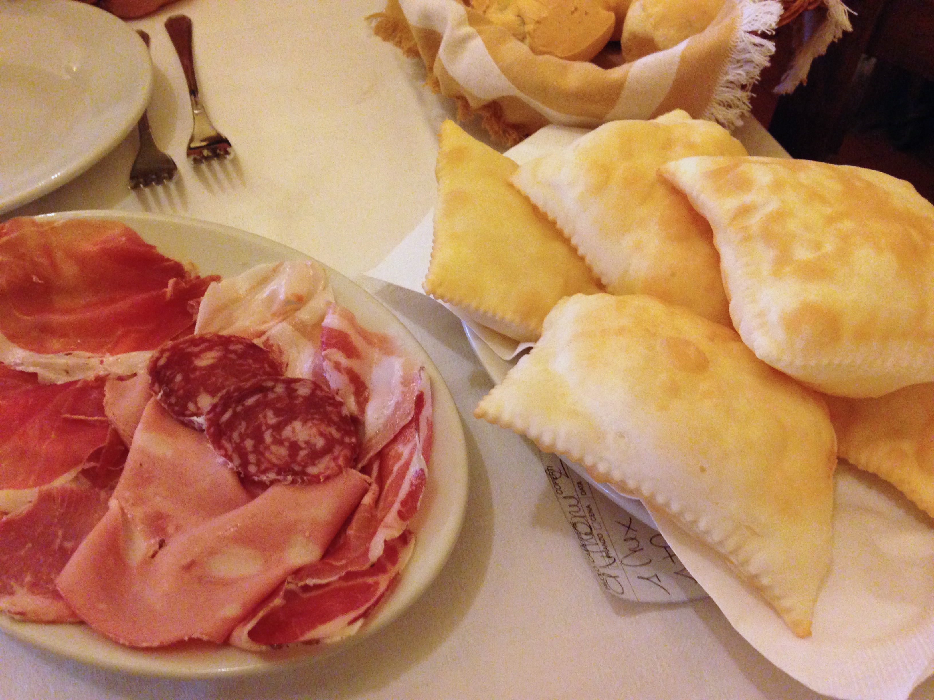 Torta fritta and salumi